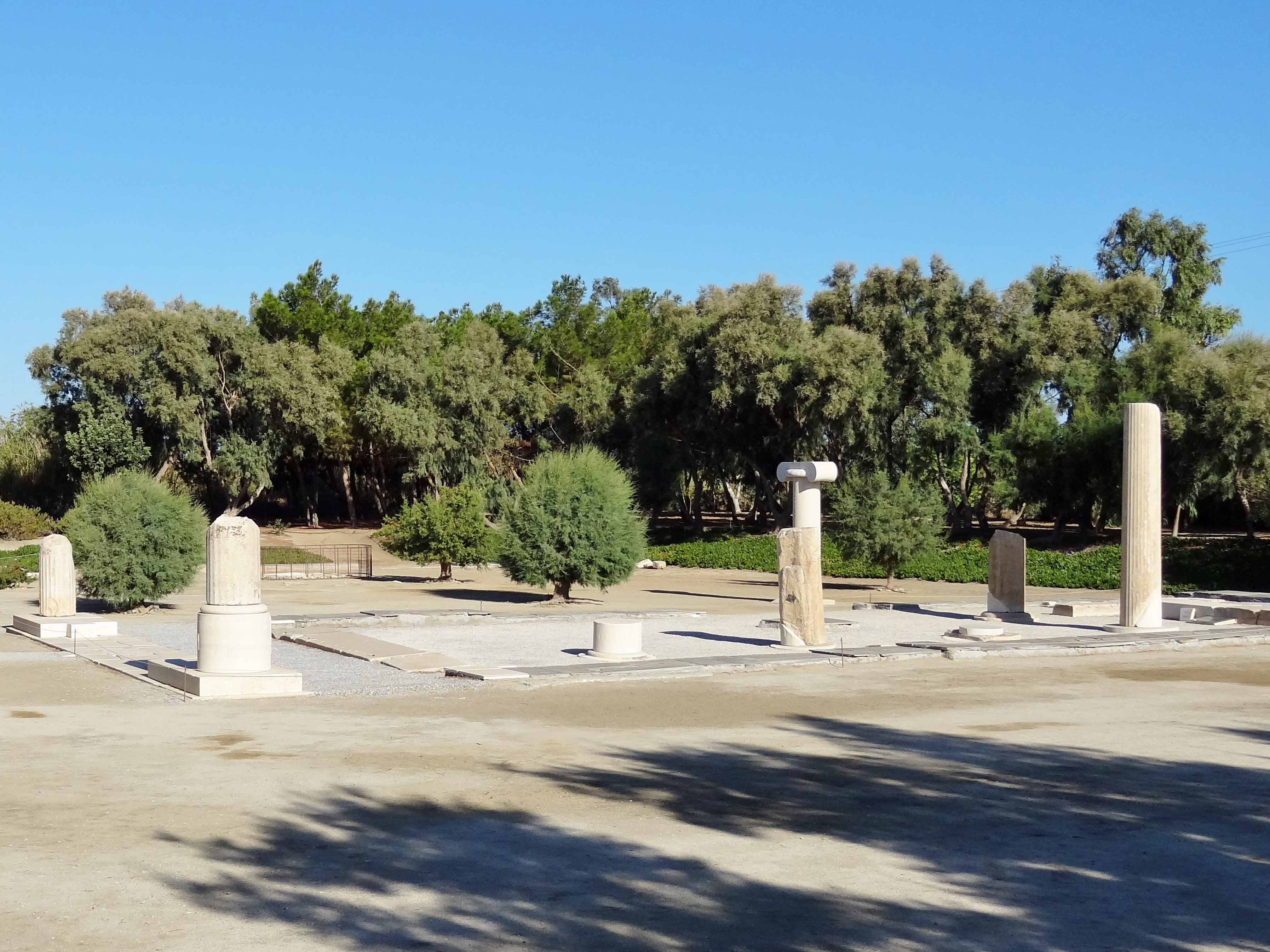 Tempel des Dionysos von Yria auf Naxos, Kykladen, Griechenland